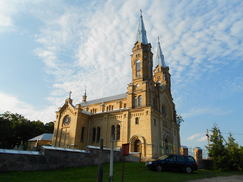 Белагруда. Міхайлаўскі касцёл